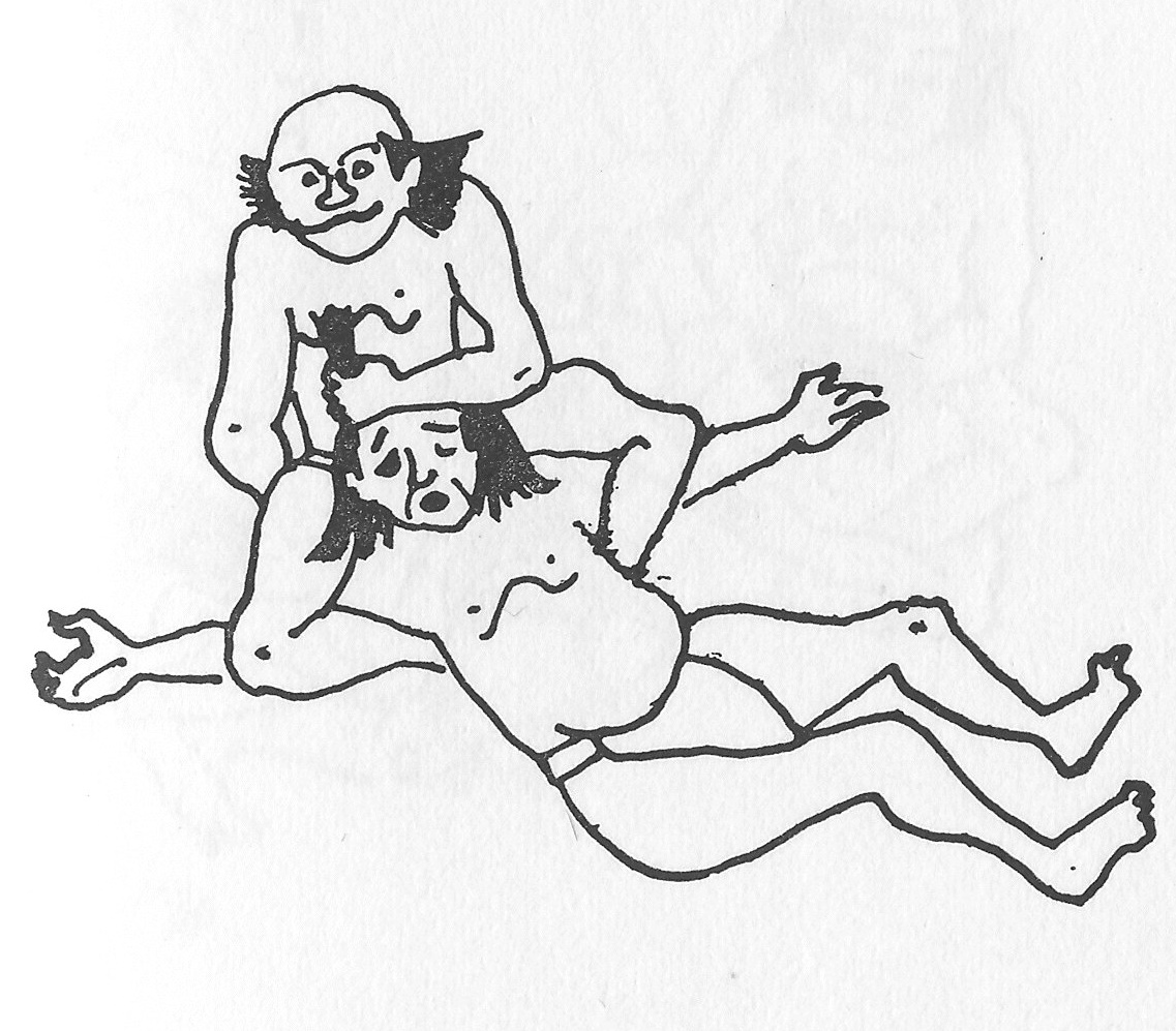 小栗流の固め技